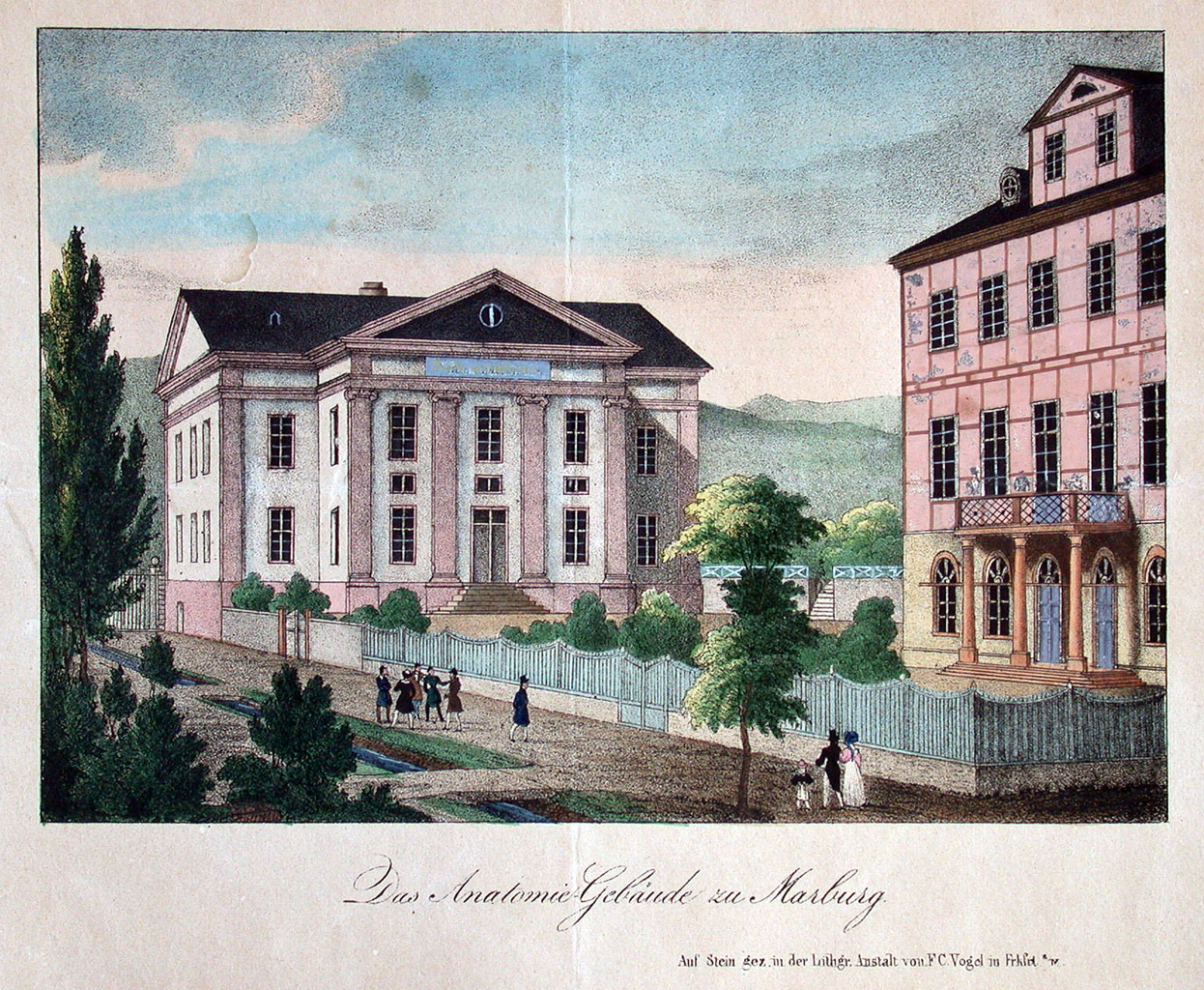 Das Anatomie-Gebäude zu Marburg. ;Auf Stein gez. in der Lithgr. Anstalt von F. C. Vogel in Frkft a/M.